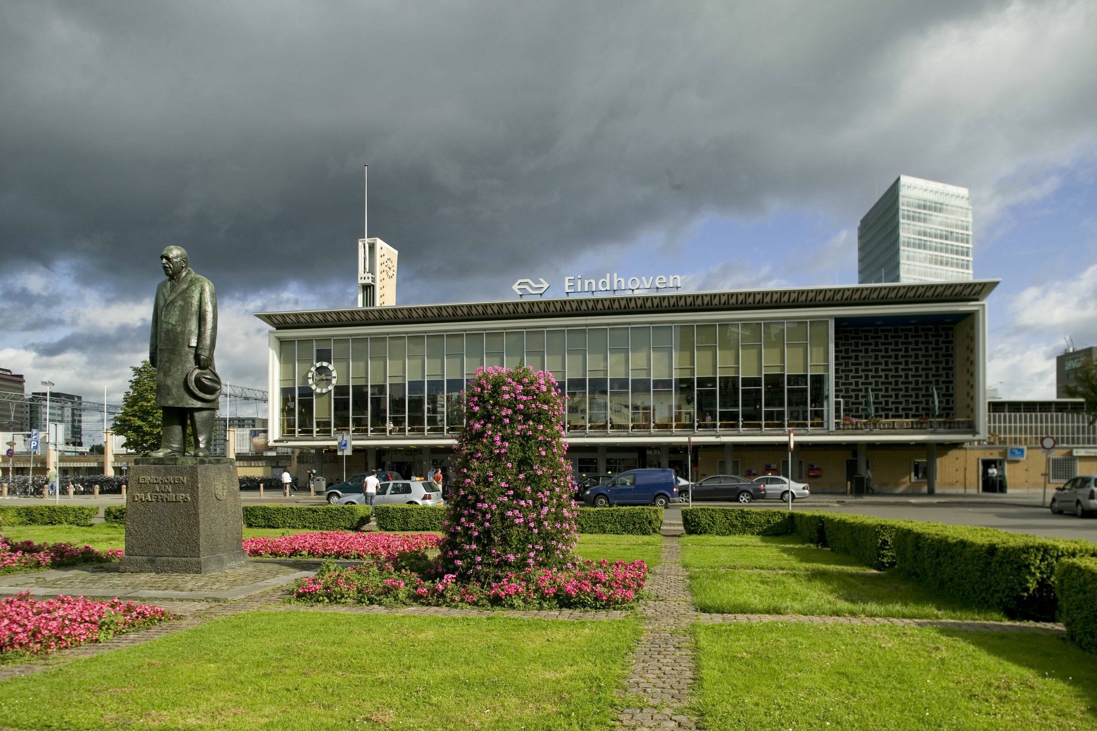 Spoorwegstation: Overzicht van de voorgevel met links een standbeeld (opmerking: Gefotografeerd voor Monumenten van Herrezen Nederland)